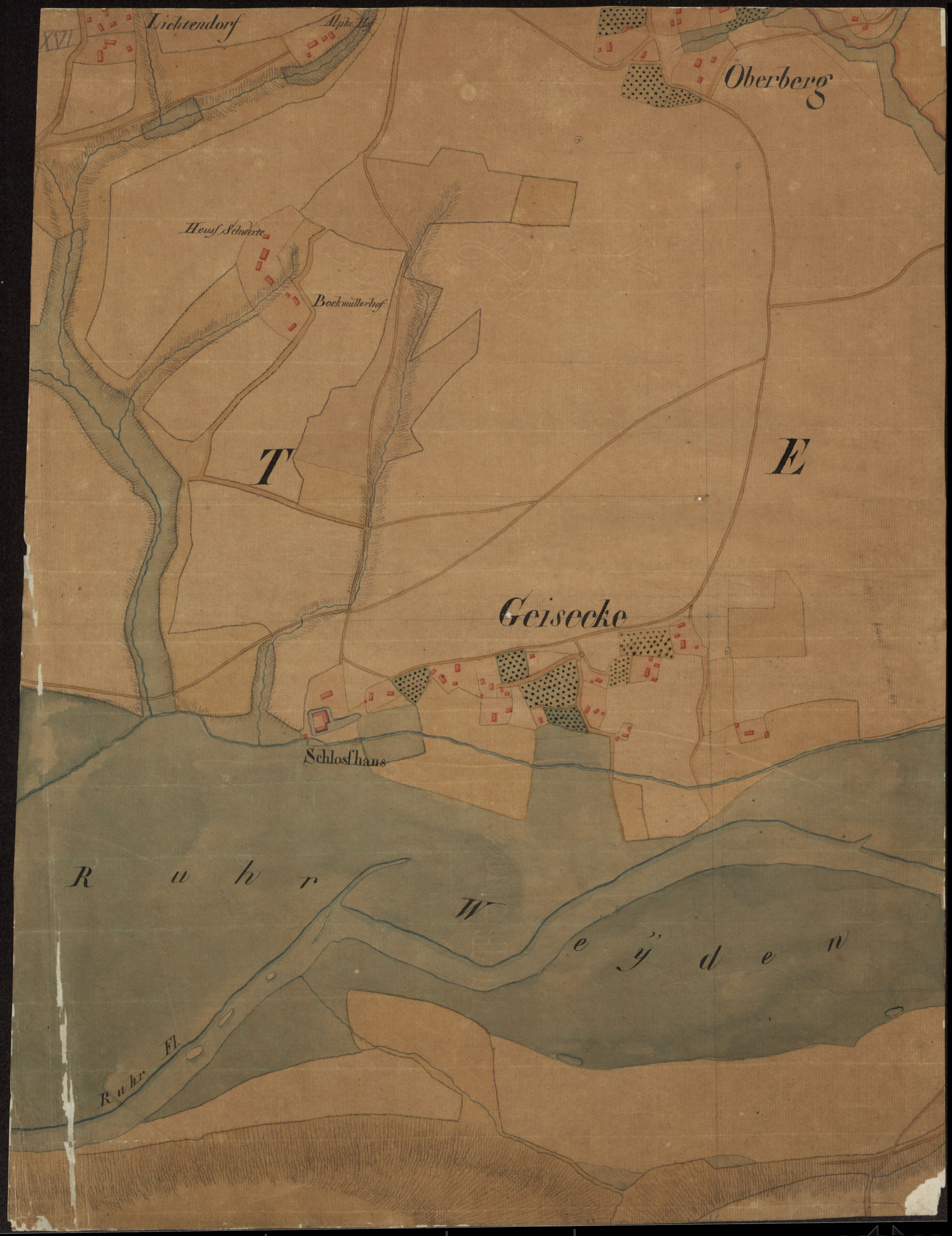 Spezialkarte des östlichen Distrikts Hörde Nachdruck als „Carte speciale des mines“.